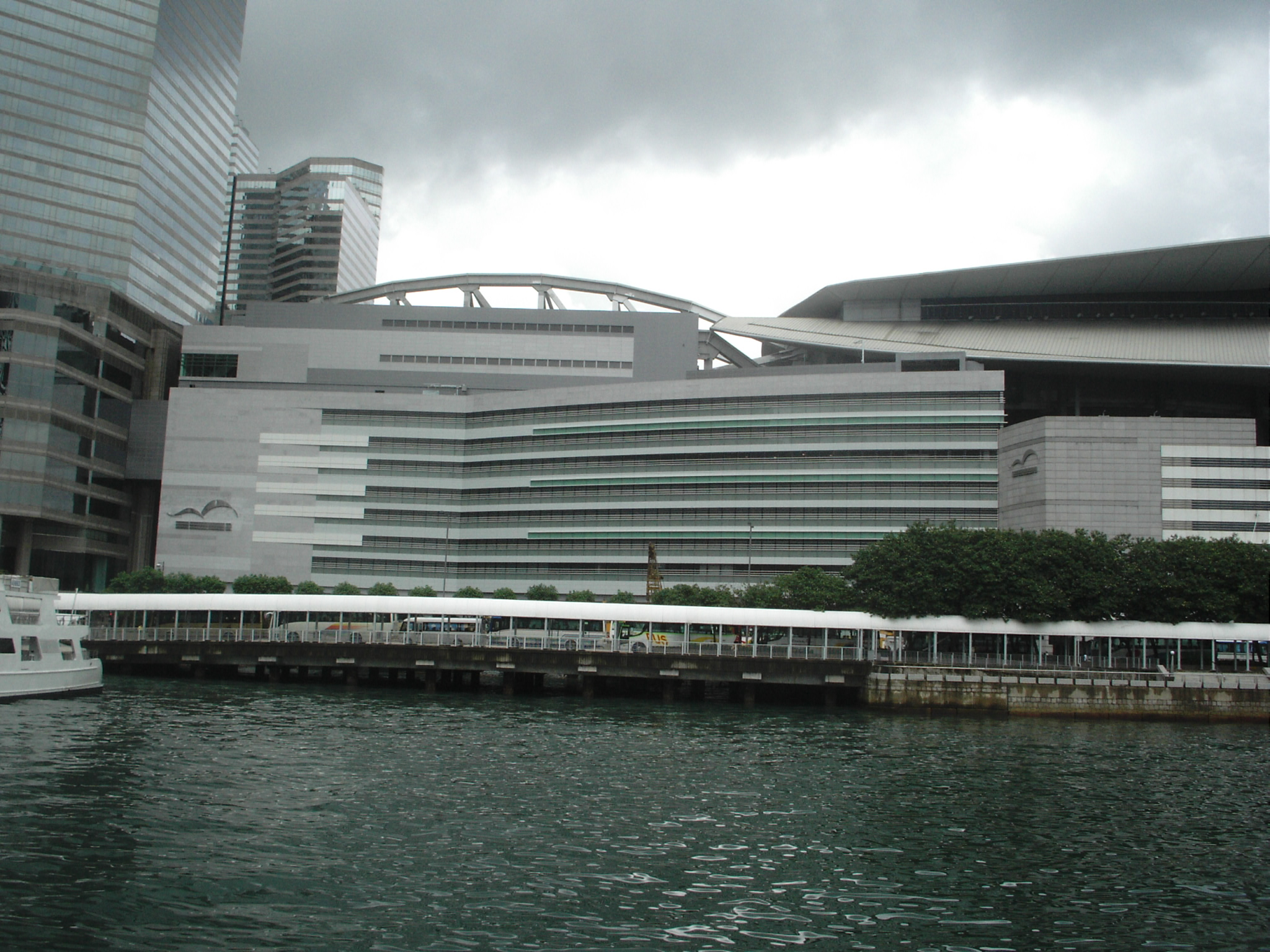 中文（香港）: 擴建後的灣仔會展中庭